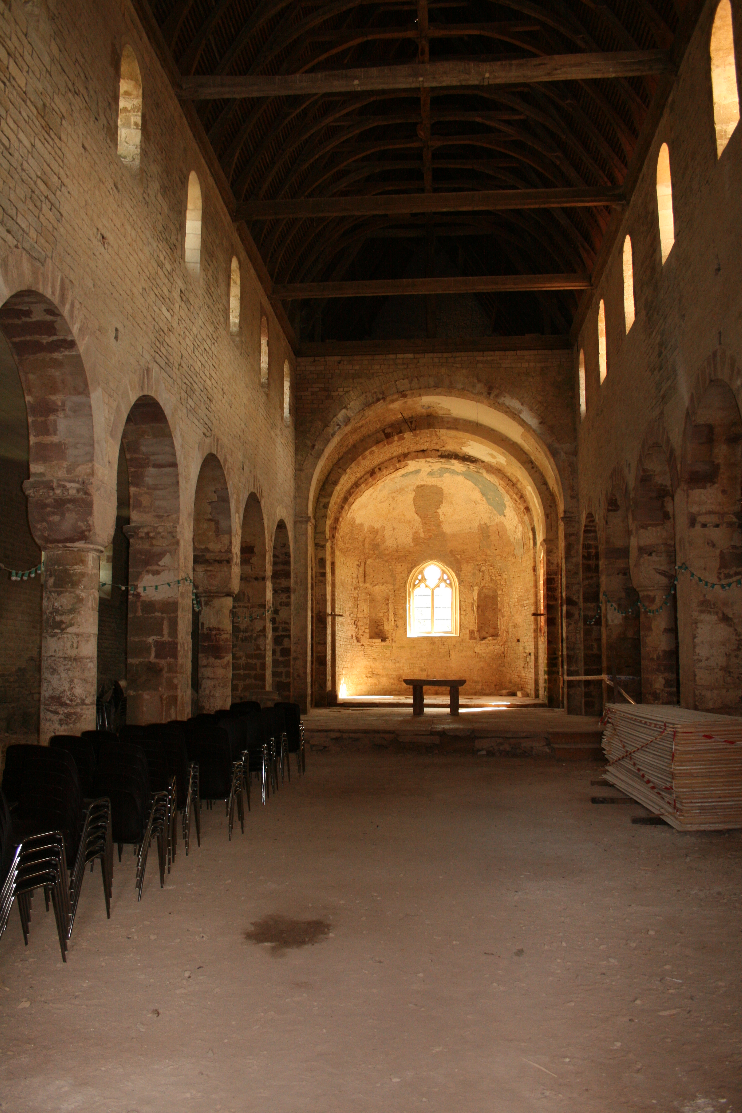 Marast Eglise Sainte Marie Madeleine vue intérieure Nef